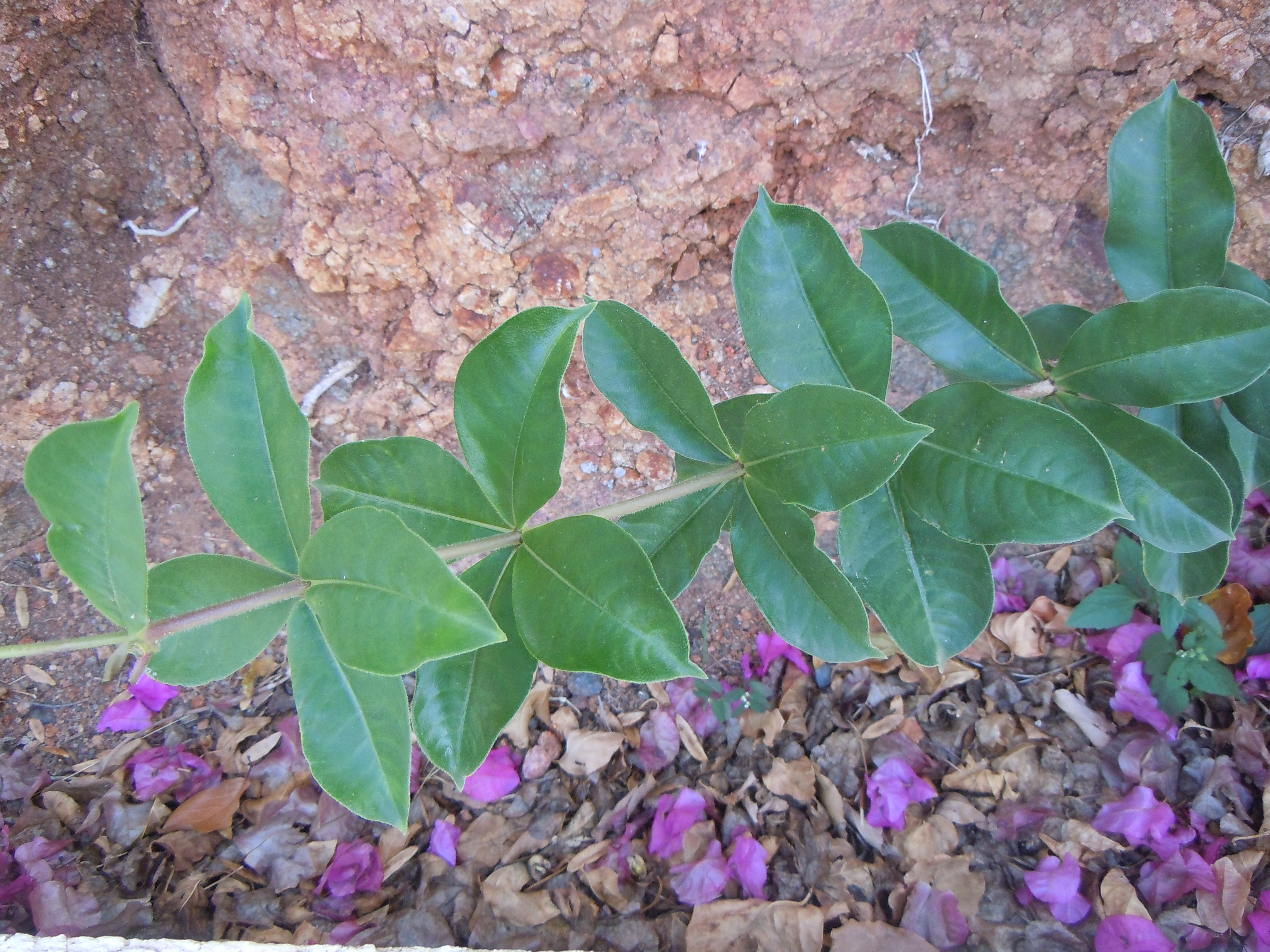 Allamanda blanchetii (Guadeloupe)